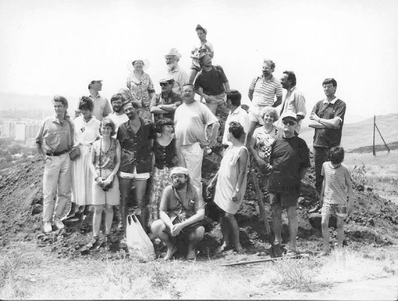 Участники II Боспорского форума на созданном ими псевдоскифском кургане Юз-Адын-Оба. Слева направо: Игорь Сид, Оксана Натолока, Иван Ахметьев, Оксана Мосендз, Владислав Кулаков, Анна Галиченко, Юрий Нечипоренко, Мария Микушевич (Власова), Мария Максимова-Столпник, Василий Аксёнов, Владимир Микушевич, Александp Голубев, Леонид Панасенко, Михаил Боде-мл., Руслан Элинин, Александр Люсый, Вероника Боде, Михаил Айзенберг, Антонина Хлебникова (Искандер), Фазиль Искандер, Тимур Кибиpов, Иван Жданов, Сандро Искандер. Керчь, гора Митридат, 20.07.1994. Фото Андрея Канищева.